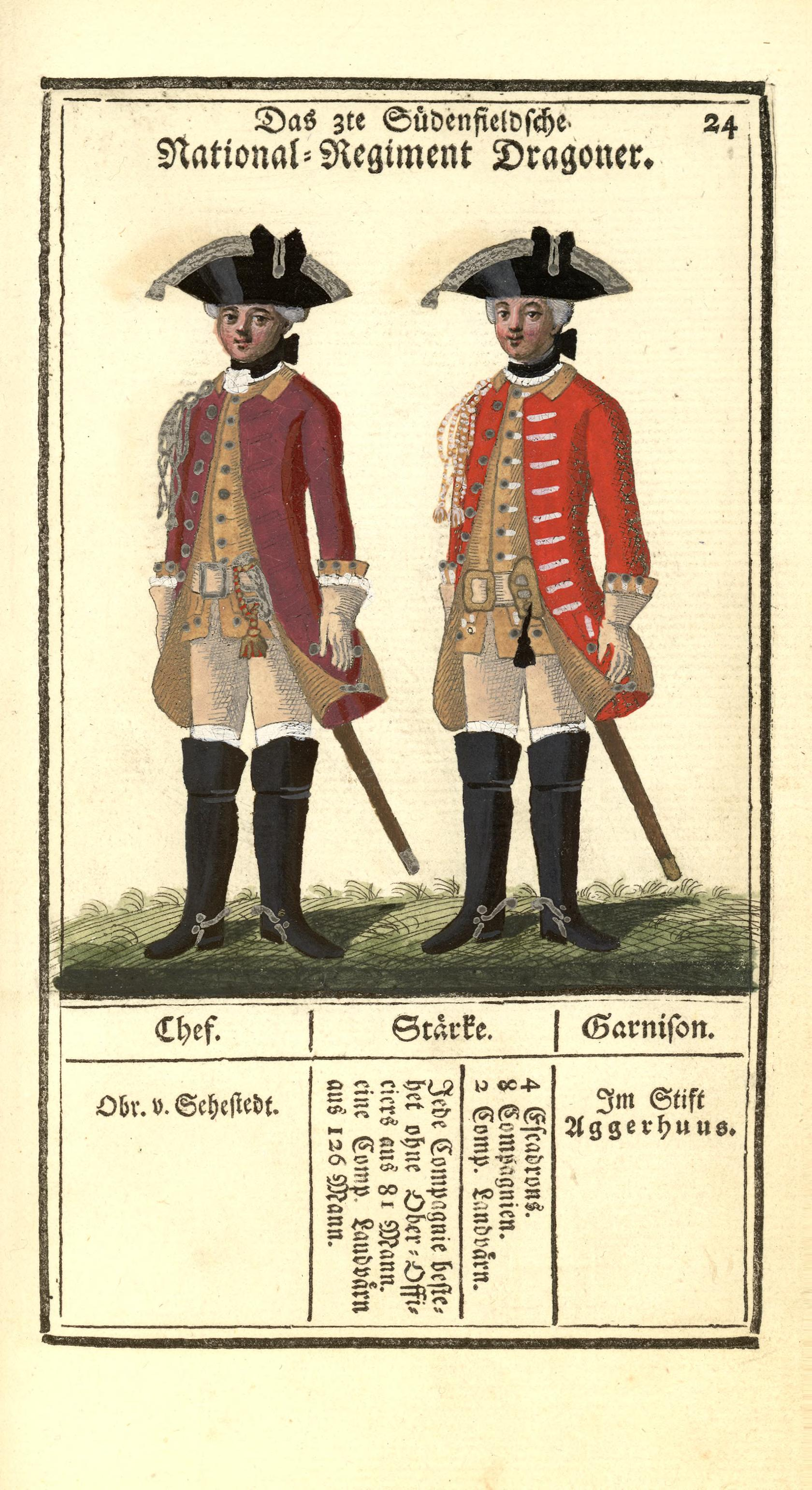 Illustrasjon hentet fra boken "Vorstellung der sämtlichen Königl. Dänischen Armee" av Bertram, Carl og utgitt av Carl Bertram (dk, 1763)